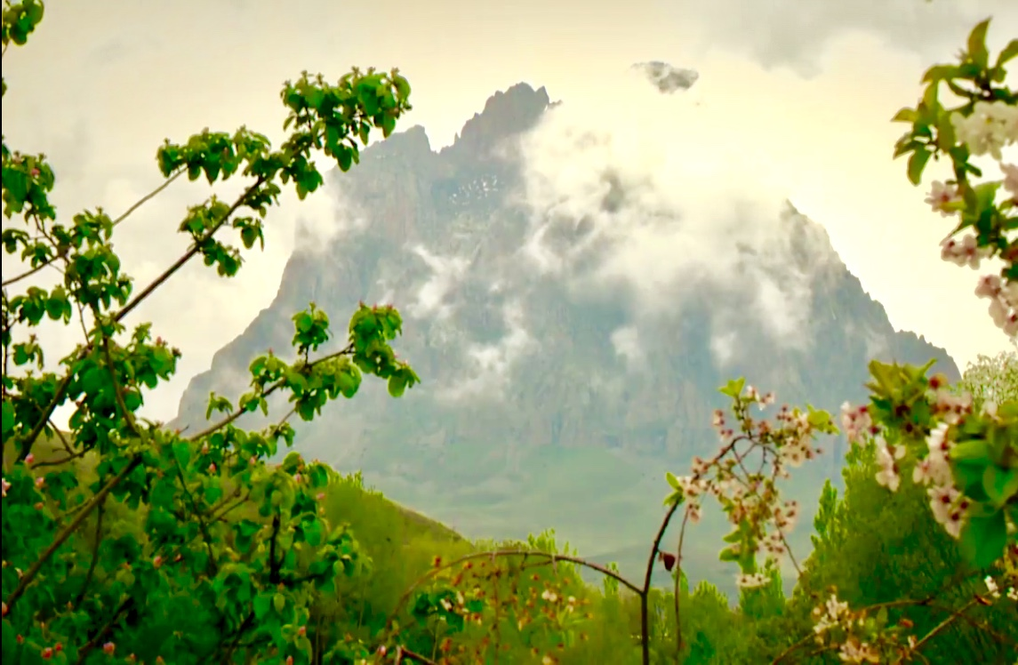 İlandağ / İlanlıdağ